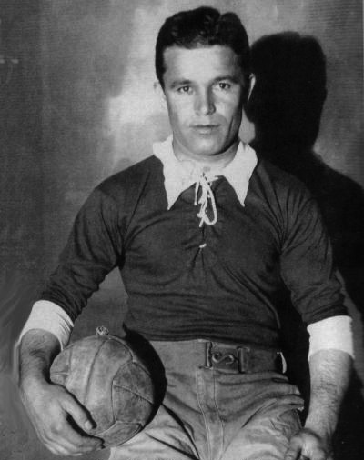 Luis Alfonso Ravaschino in Independiente colours